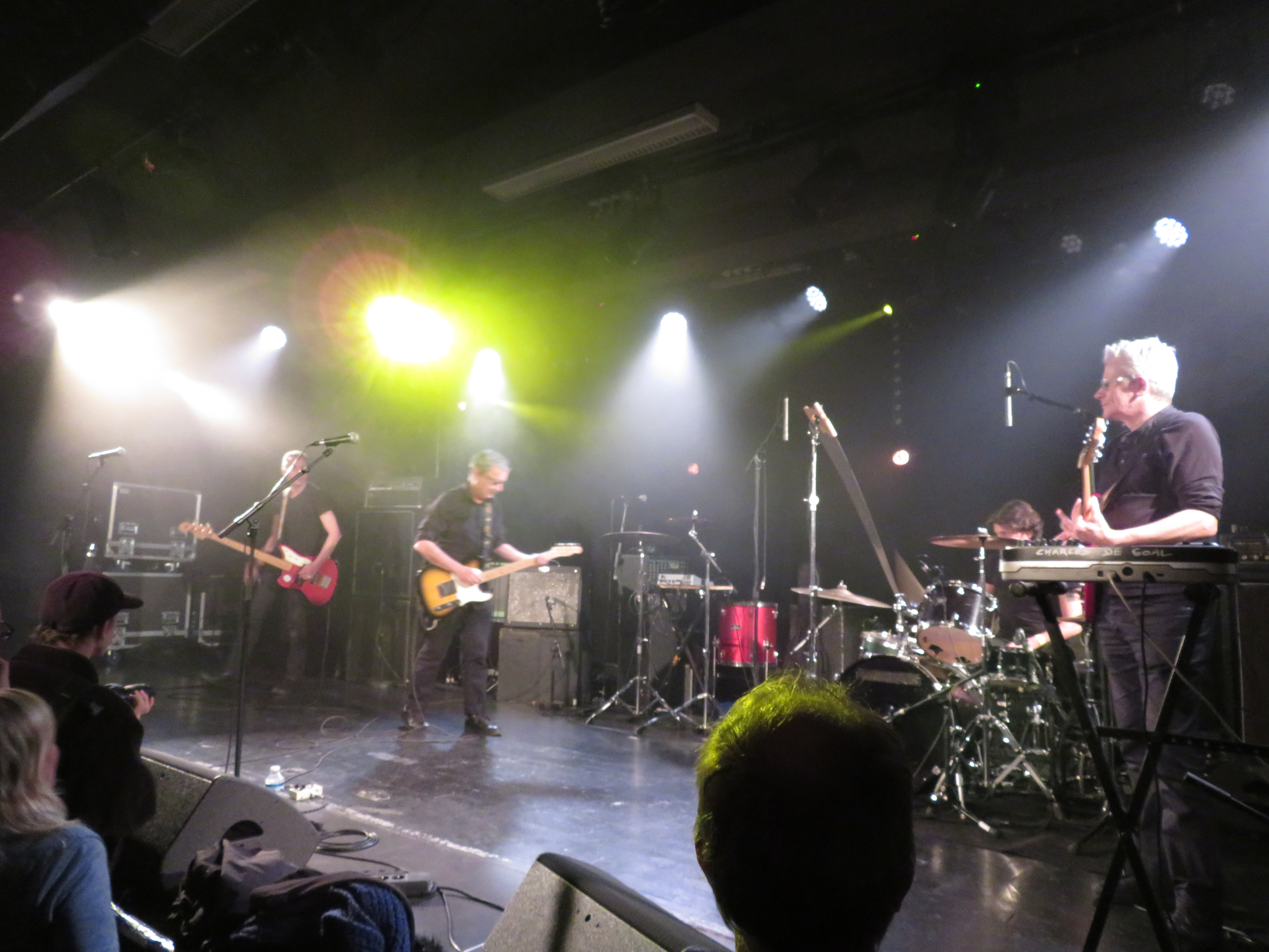 Le groupe français de punk rock Charles de Goal, en concert à Beauvais (Oise), le samedi 10 février 2018.